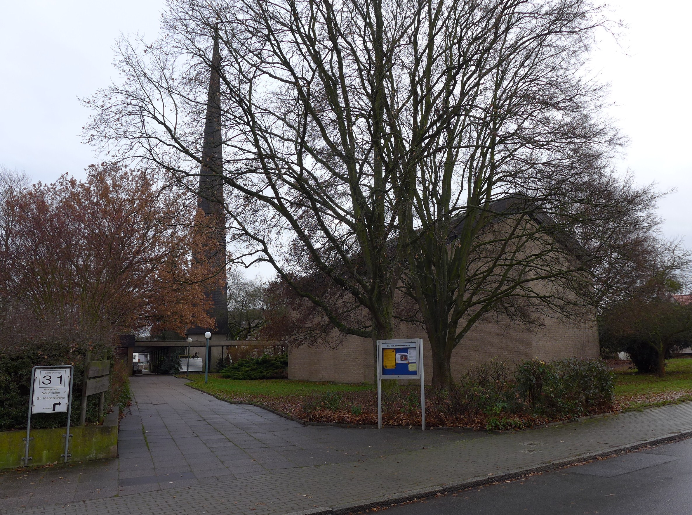 Neustädter St Marienkirche Einbeck